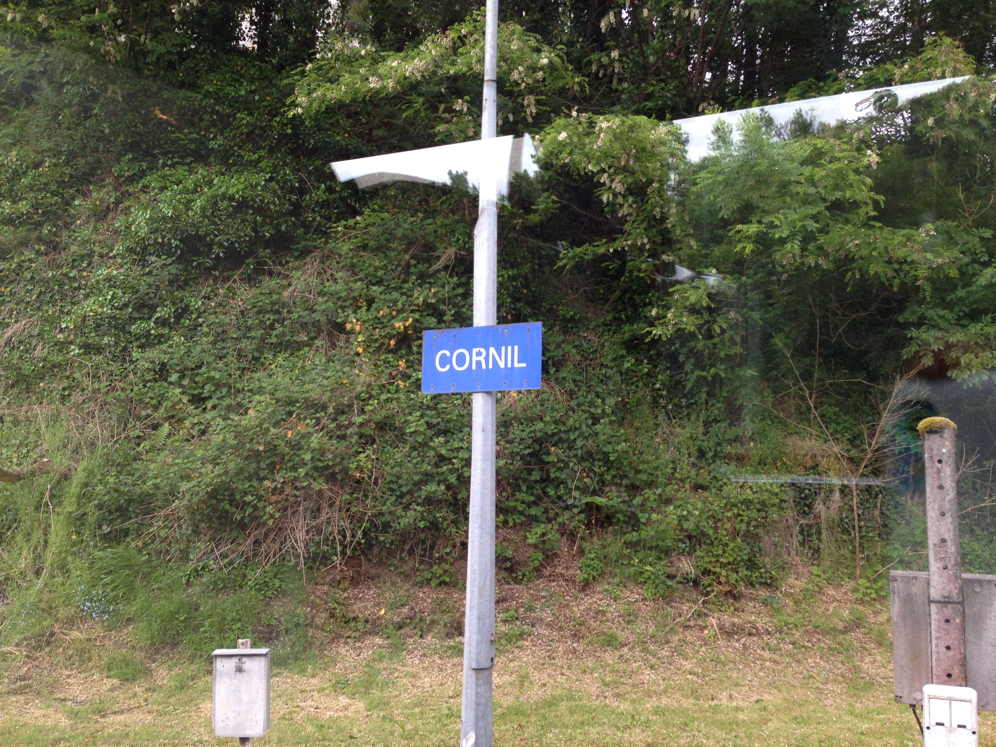 Panneau de la Gare de Cornil